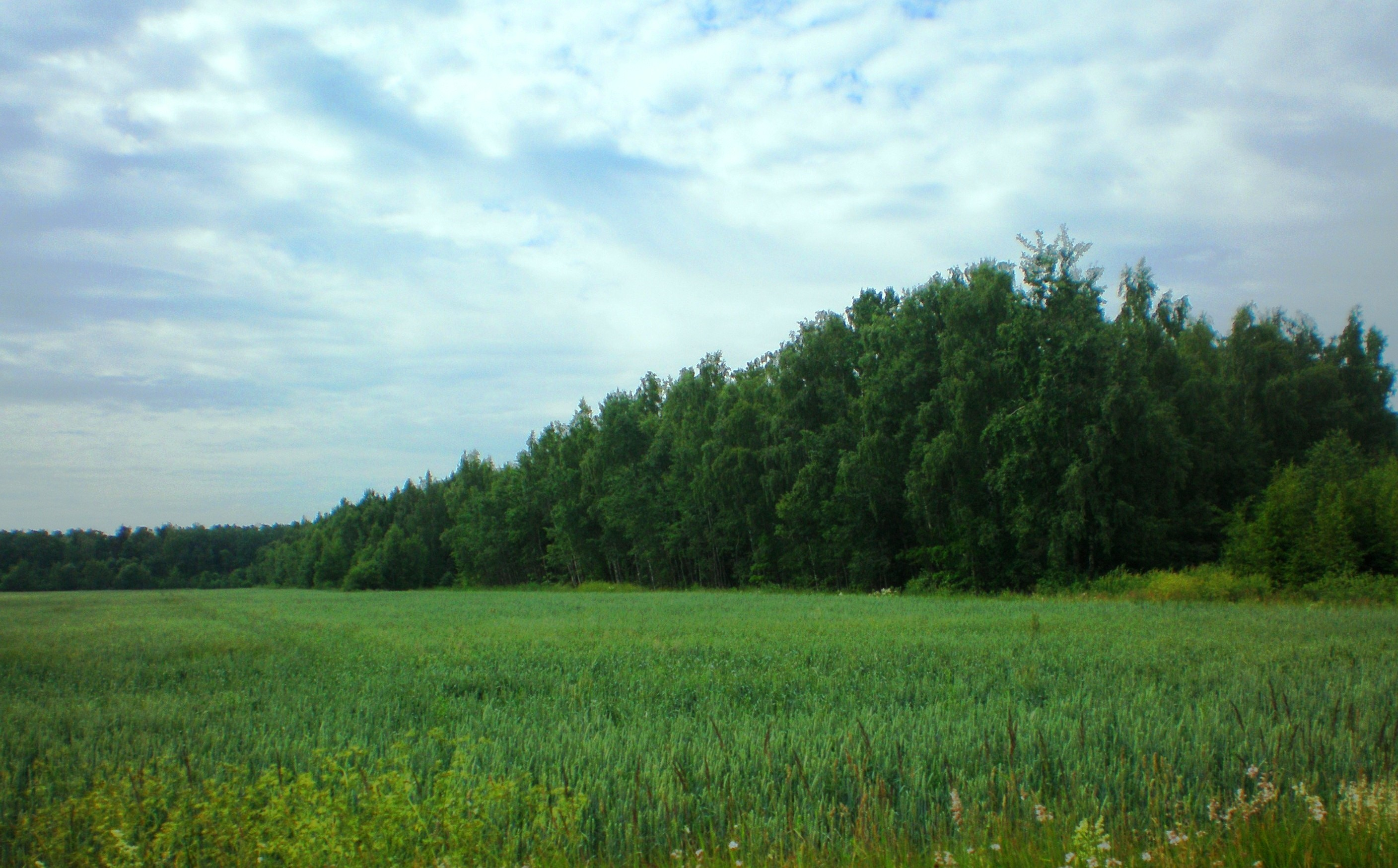 Sosių miškas tarp Lažų ir Miegėnų, Kėdainių raj.